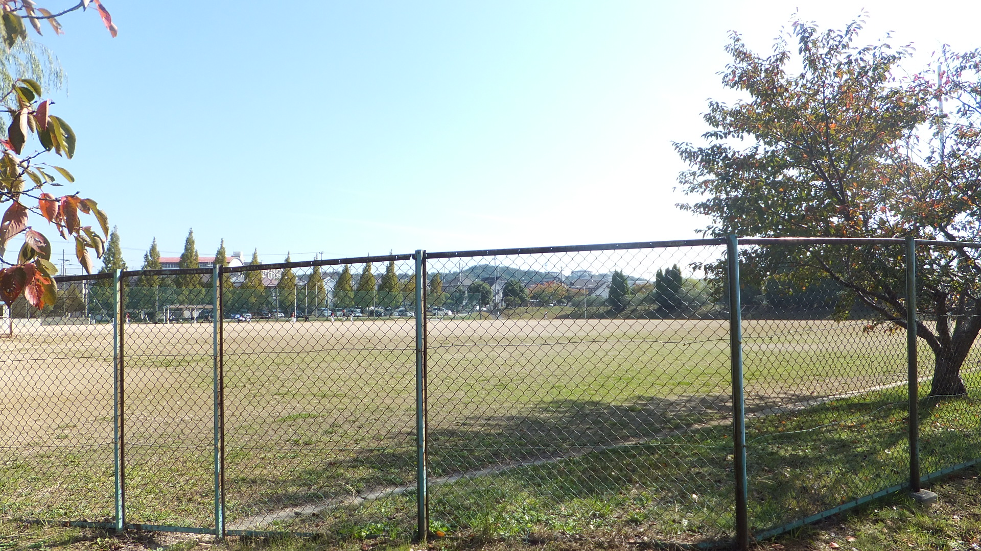 緑が丘スポーツ公園